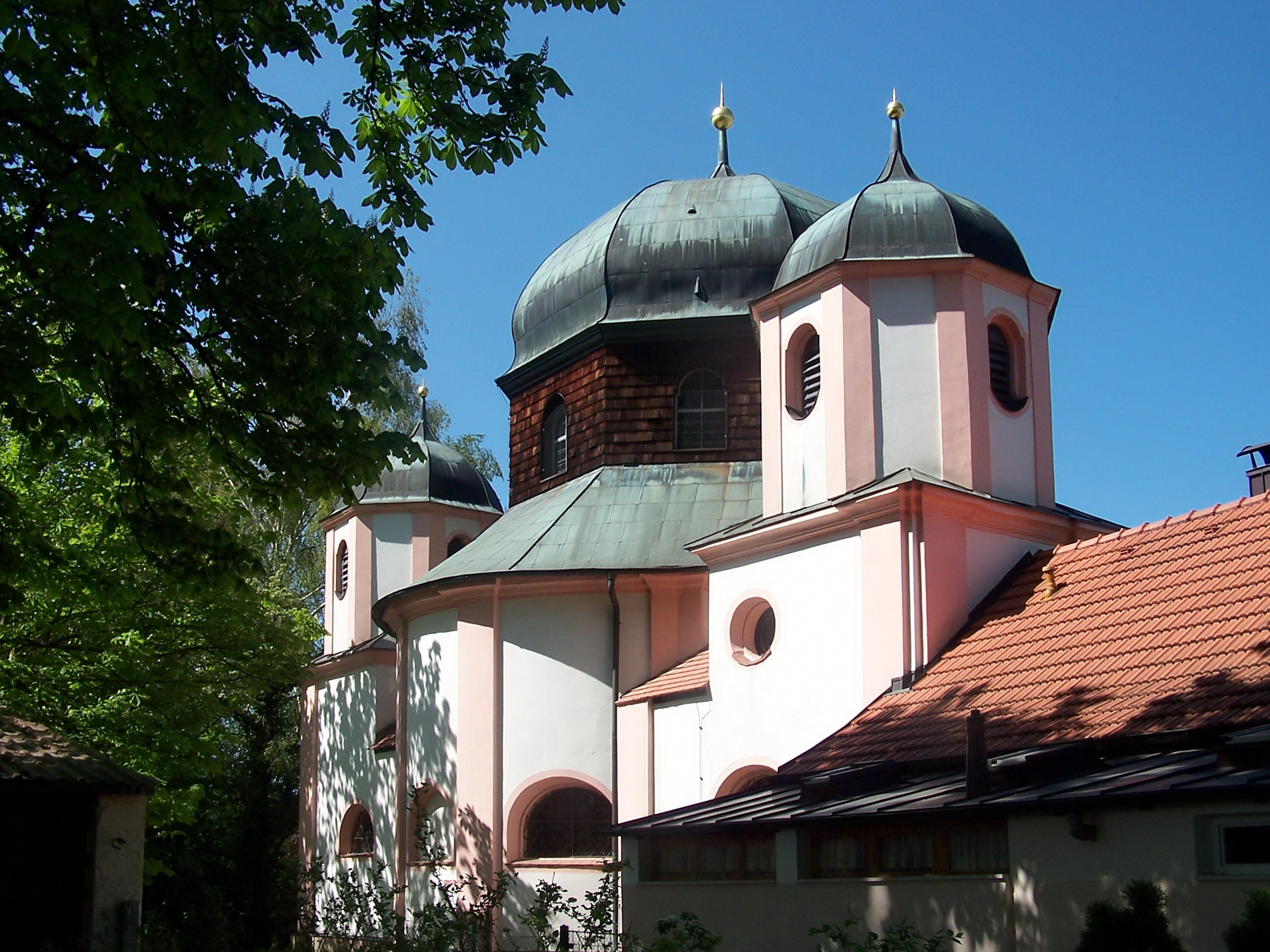 Straubing, Frauenbrünnlstraße 117. Kath. Wallfahrtskirche "Unserer Lieben Frau", barocker Zentralbau mit drei Konchen und Vorhalle, von kleinen Türmen flankierte Kuppel, 1705/07 erbaut; mit Ausstattung; angebautes Wohnhaus mit Walmdach, 18. Jh.; Mariengrotte über Quelle, an der Nordseite.